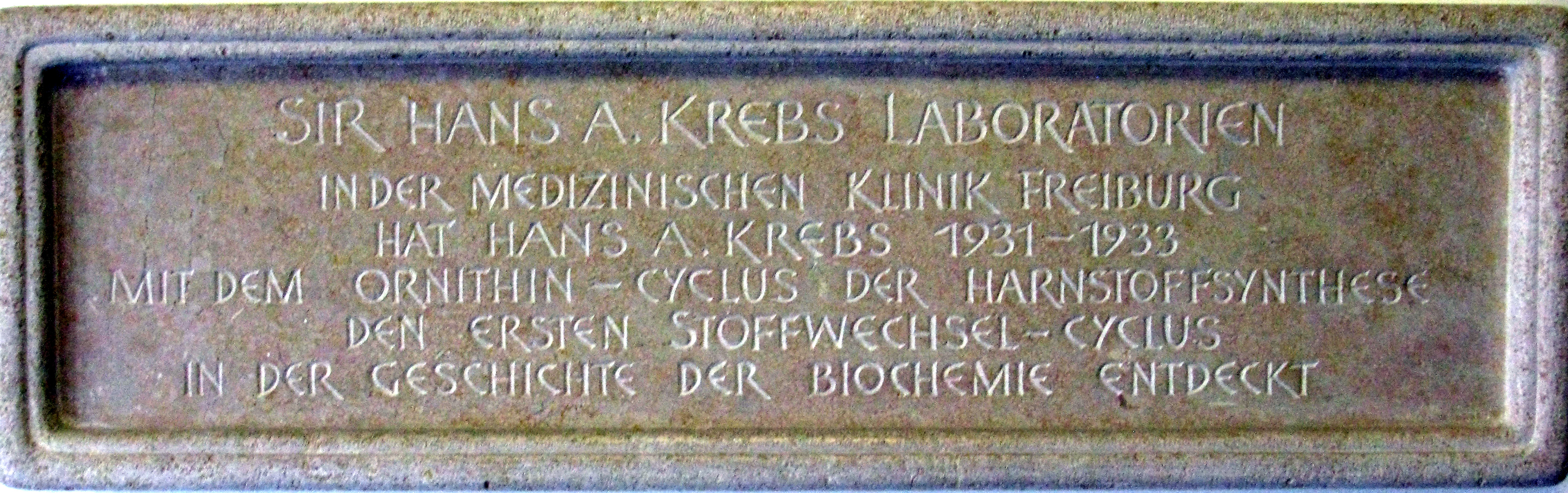 Gedenktafel im Hauptgeschoss der medizinischen Uniklinik Freiburg auf Station De la Camp, Inschrift:SIR HANS A. KREBS LABORATORIENIN DER MEDIZINISCHEN KLINIK FREIBURGHAT HANS A. KREBS 1931-1933MIT DEM ORNITHIN-CYCLUS DER HARNSTOFFSYNTHESEDEN ERSTEN STOFFWECHSEL-CYCLUSIN DER GESCHICHTE DER BIOCHEMIE ENTDECKT